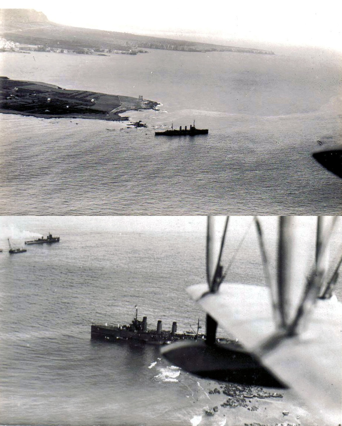 L’incrociatore leggero Bari incagliato presso Terrasini.